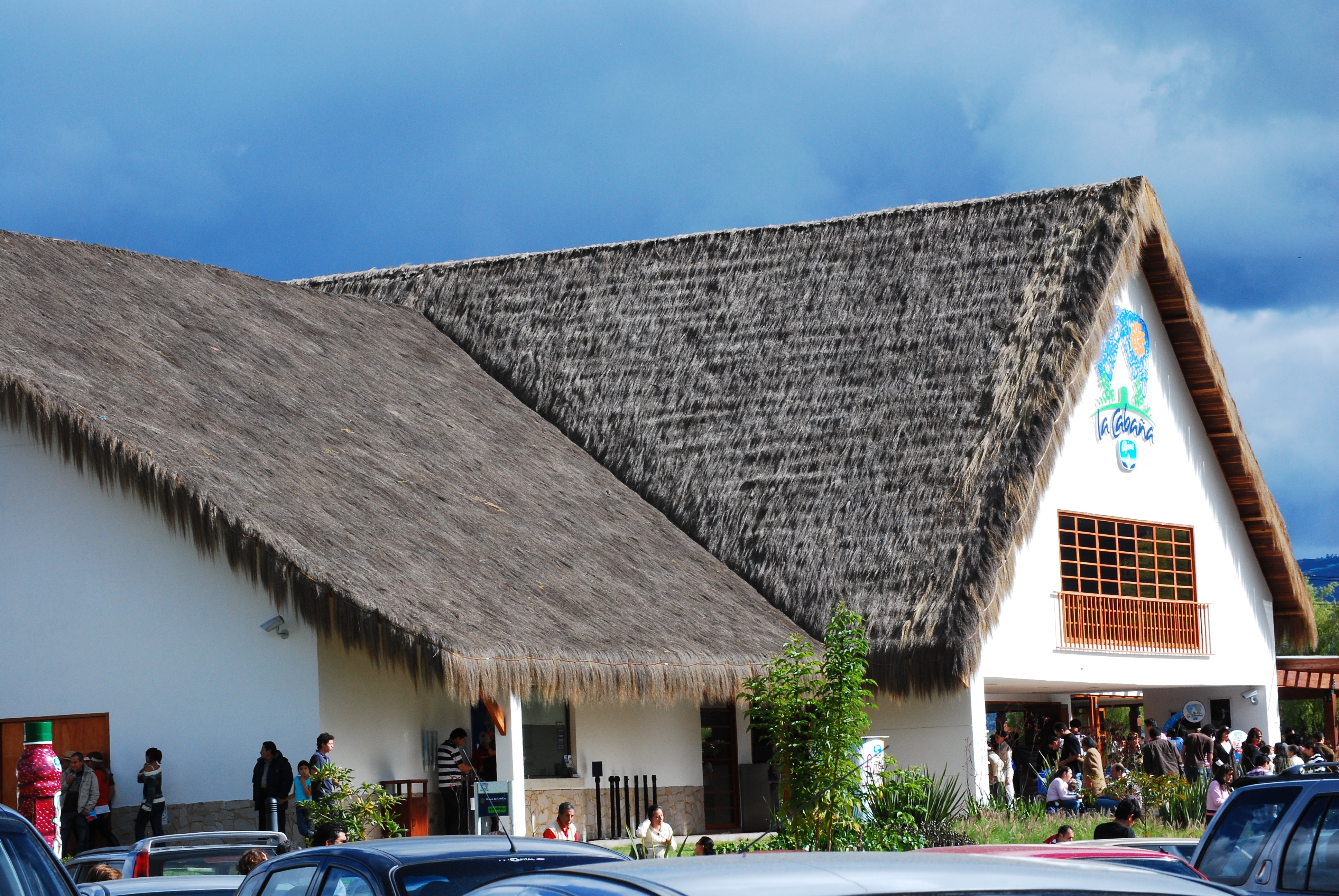 La cabaña de Alpina